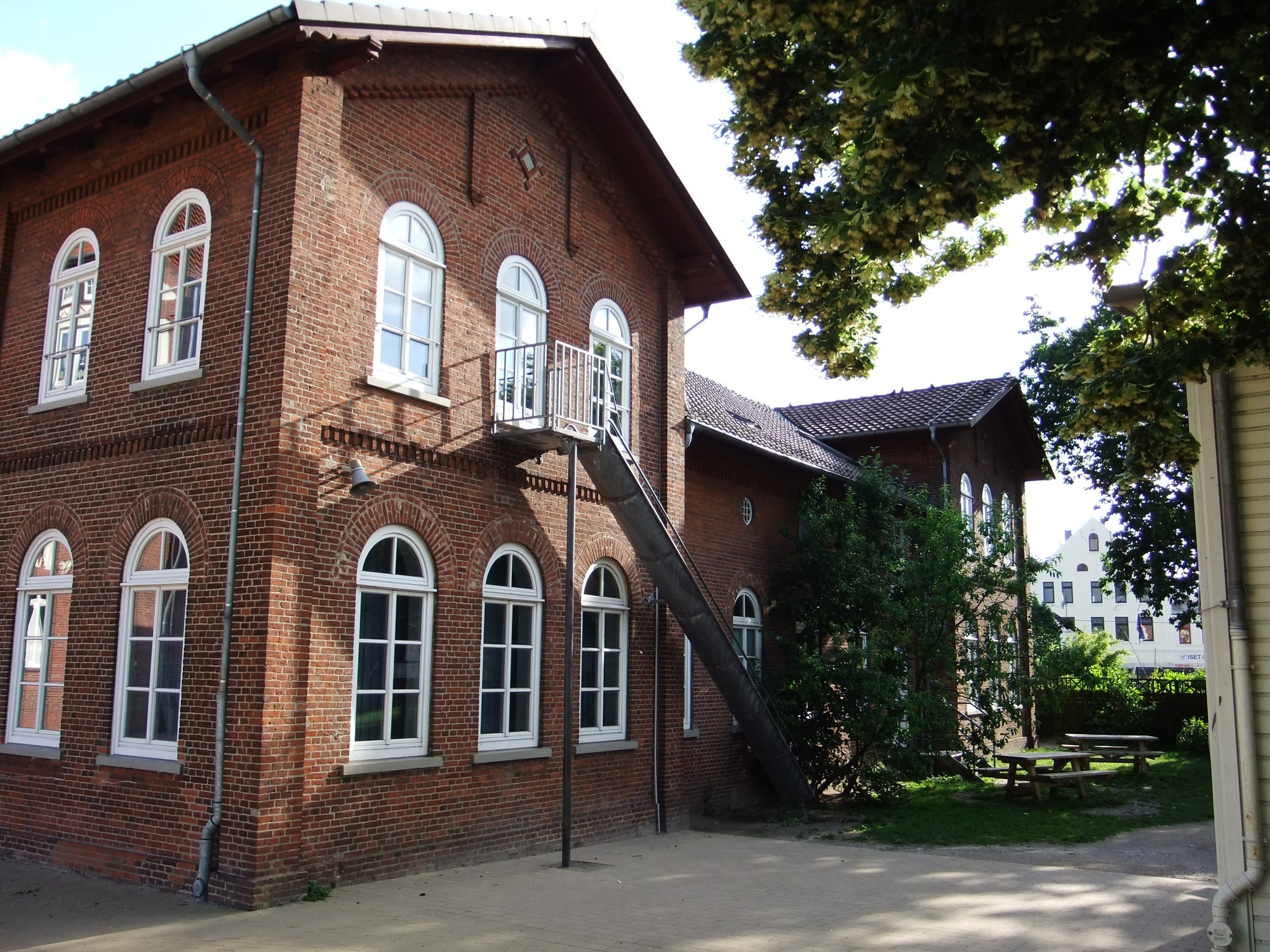 Wulsdorfer Schule in Bremerhaven, Sandbredenstraße 11.Das abgebildete Objekt ist ein geschütztes Kulturdenkmal in der Freien Hansestadt Bremen, mit der Nr. 3157 beim Landesamt für Denkmalpflege registriert.